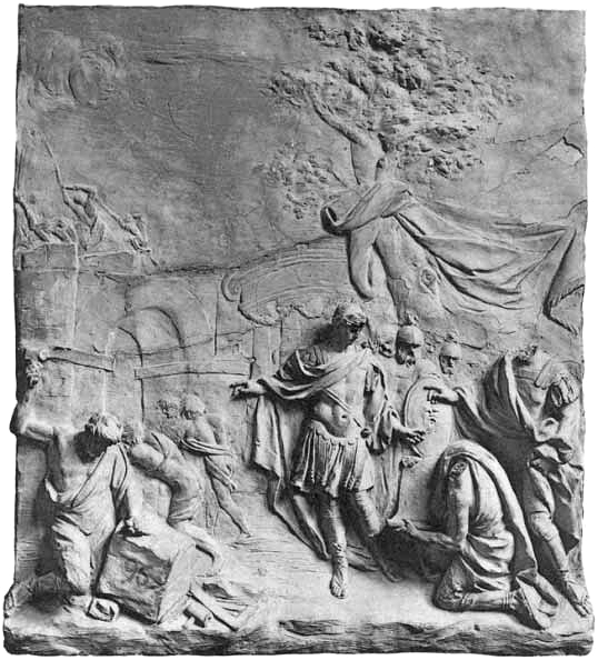 José Arias, La construcción del puente de Alcántara en Toledo, 1766. En su composición pudo inspirarse Goya para su Aníbal vencedor contempla por primera vez Italia desde los Alpes.